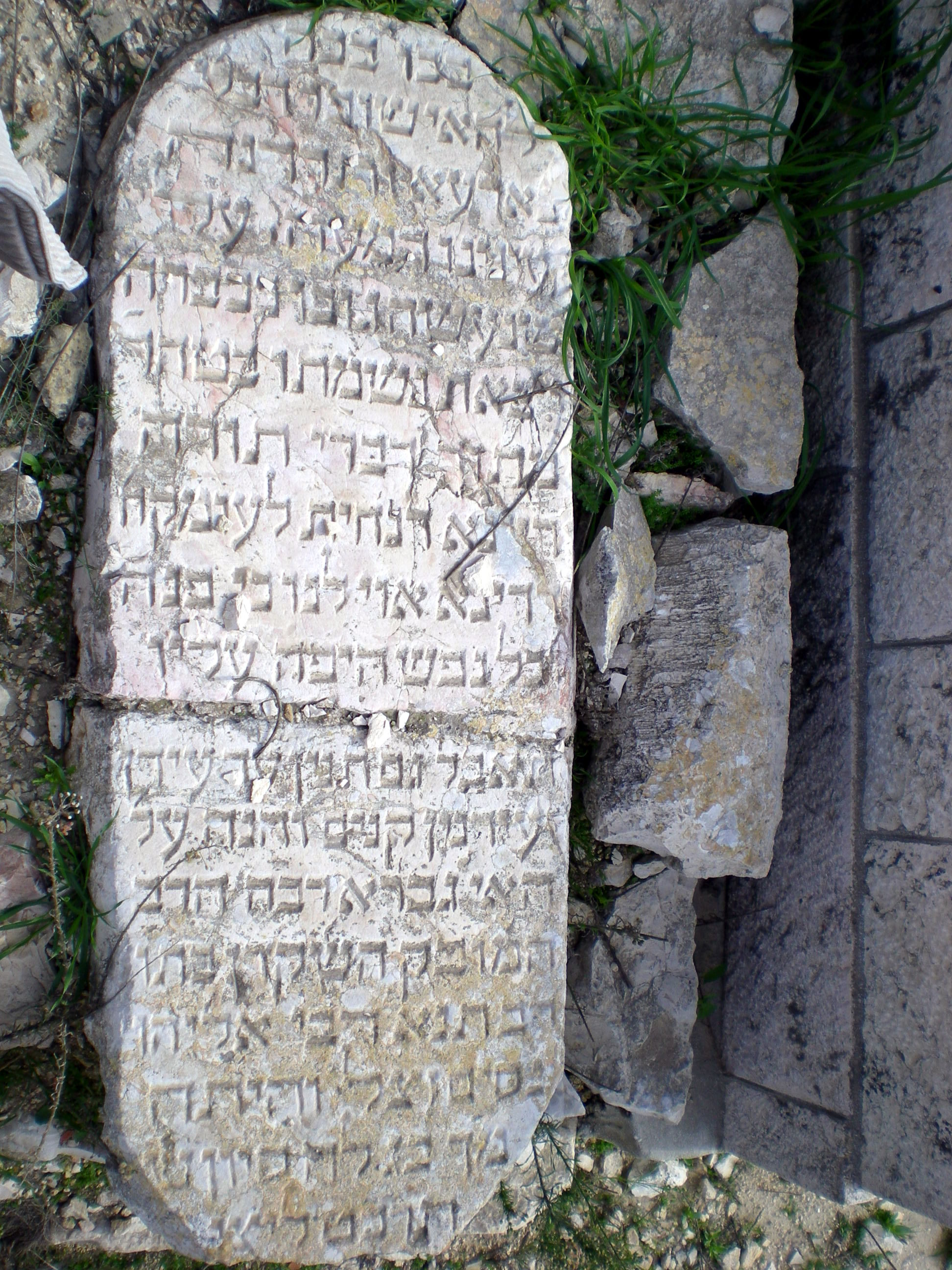 קבר אליהו נסים